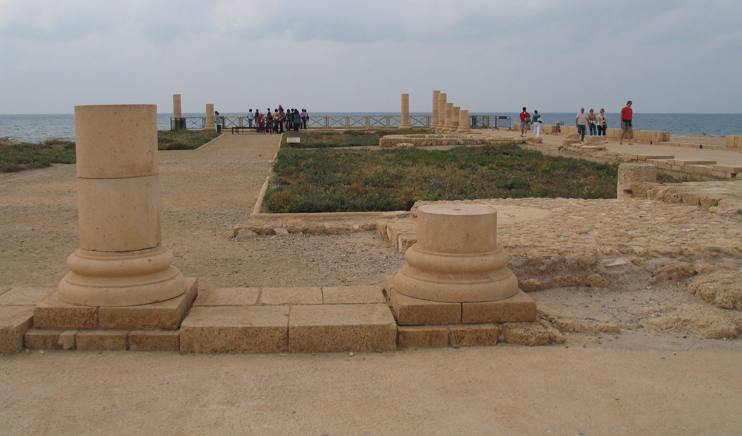 Caesarea Maritima, Israel. Palace.